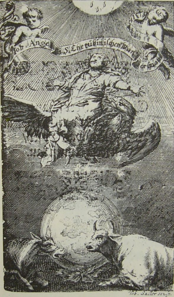 Stich im Buch "Cherubinischer Wandersmann" von Angelus Silesius